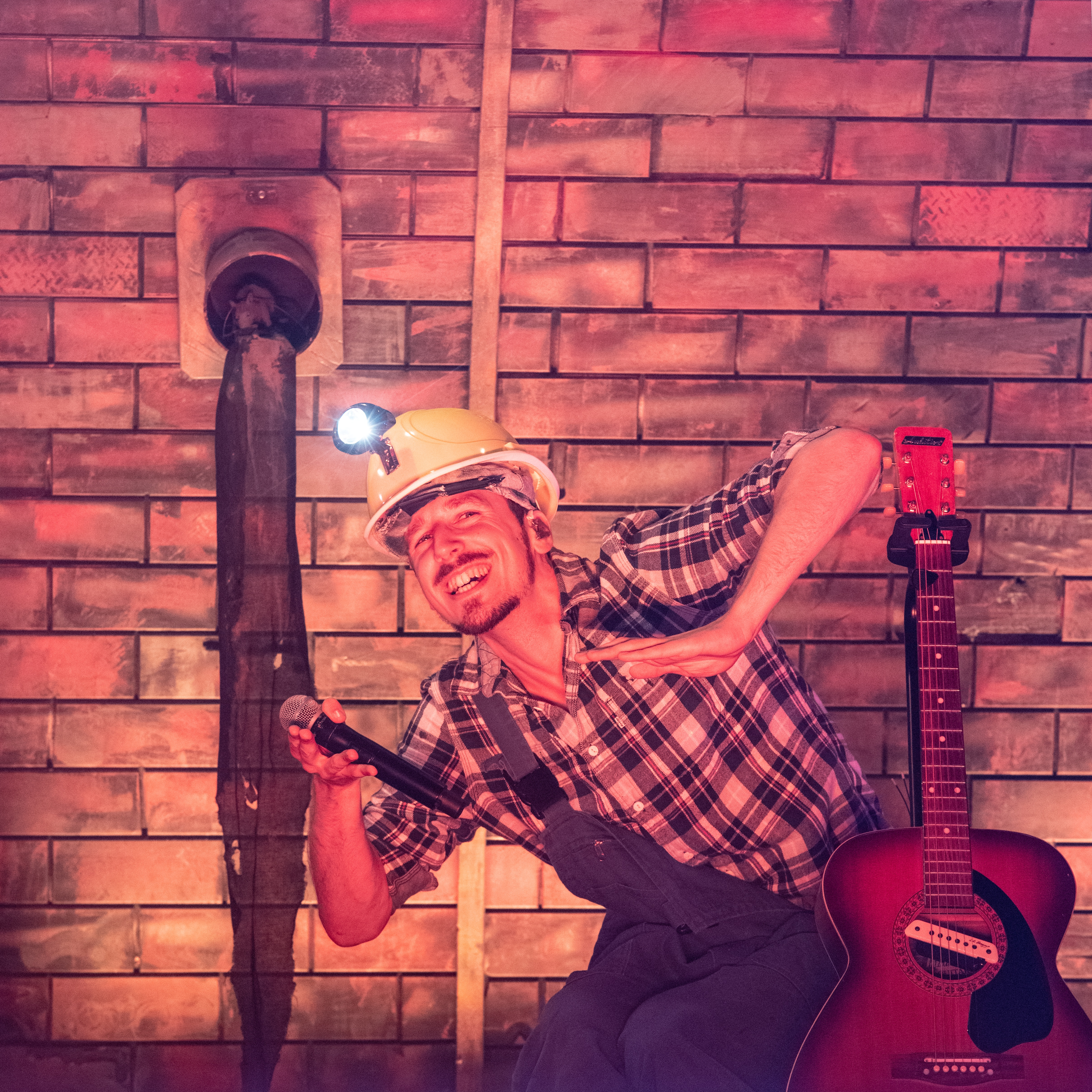 Bilder vom Zelt Musik Festival 2018 in Freiburg im Breisgau Auftritt Alligatoah und Sebel am 20. Juli 2018 im Zirkuszelt